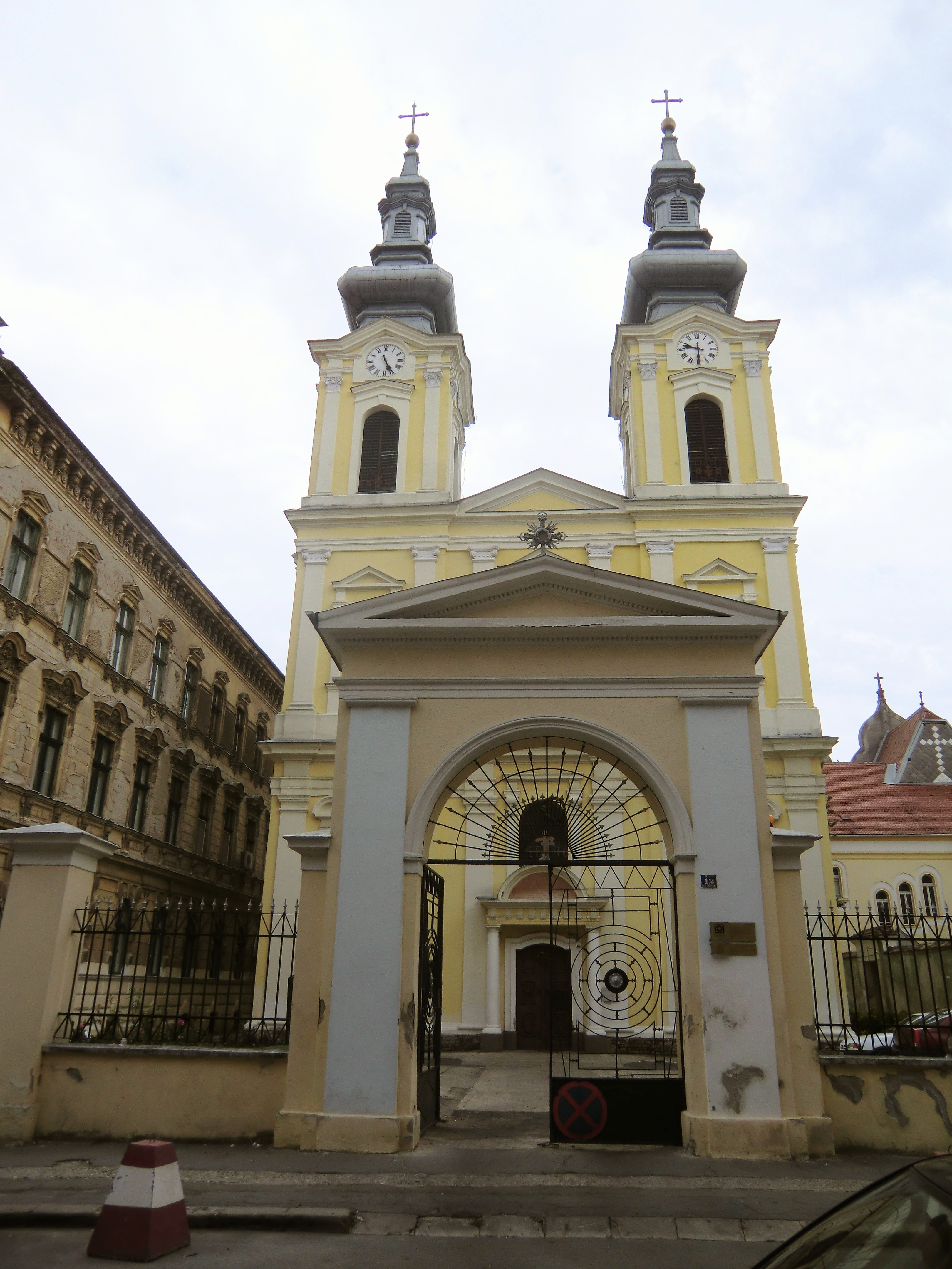 Serbisch-orthodoxe Kathedrale, Hauptportal